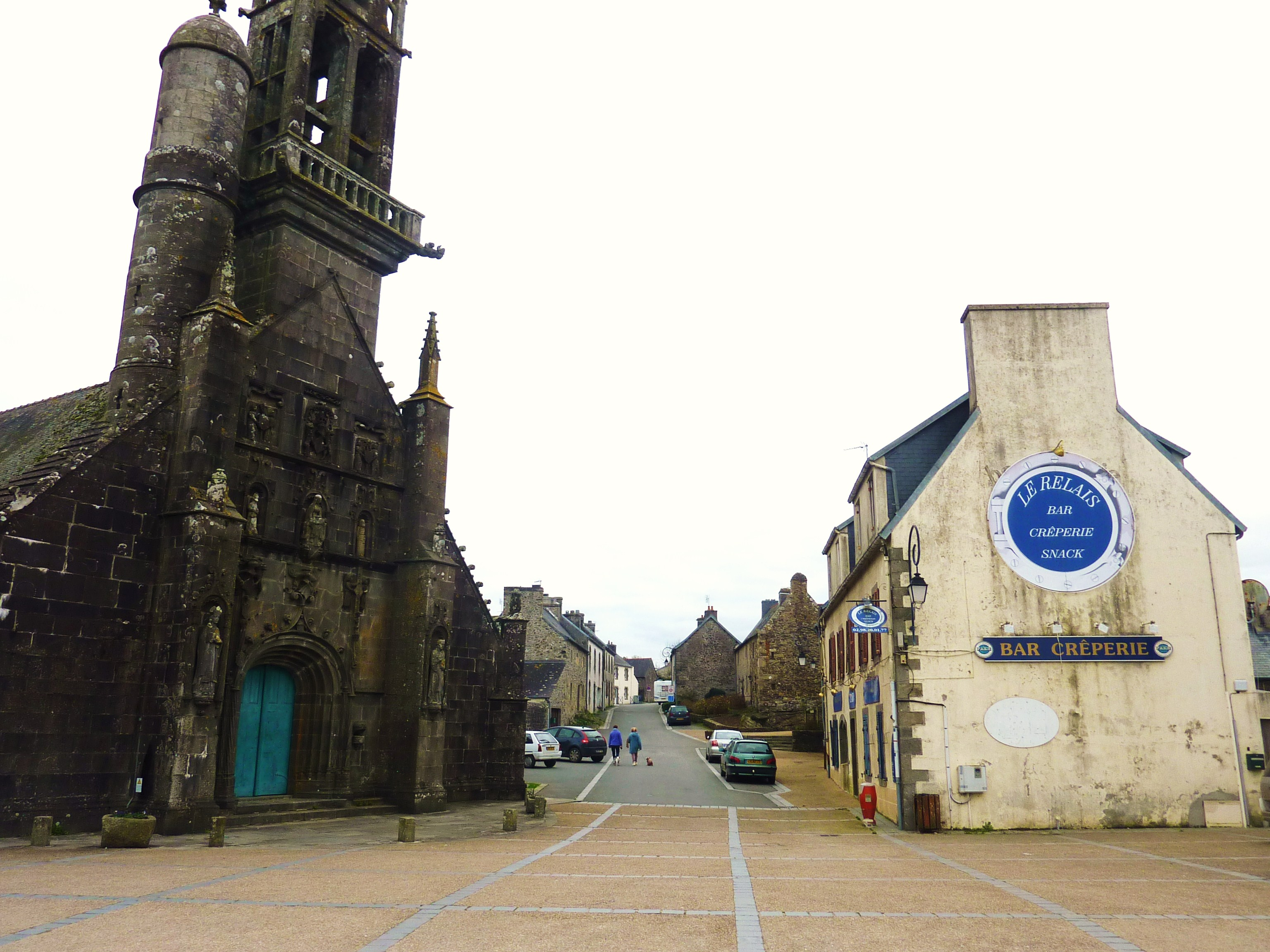 L'Hôpital-Camfrout : rue ancienne du village